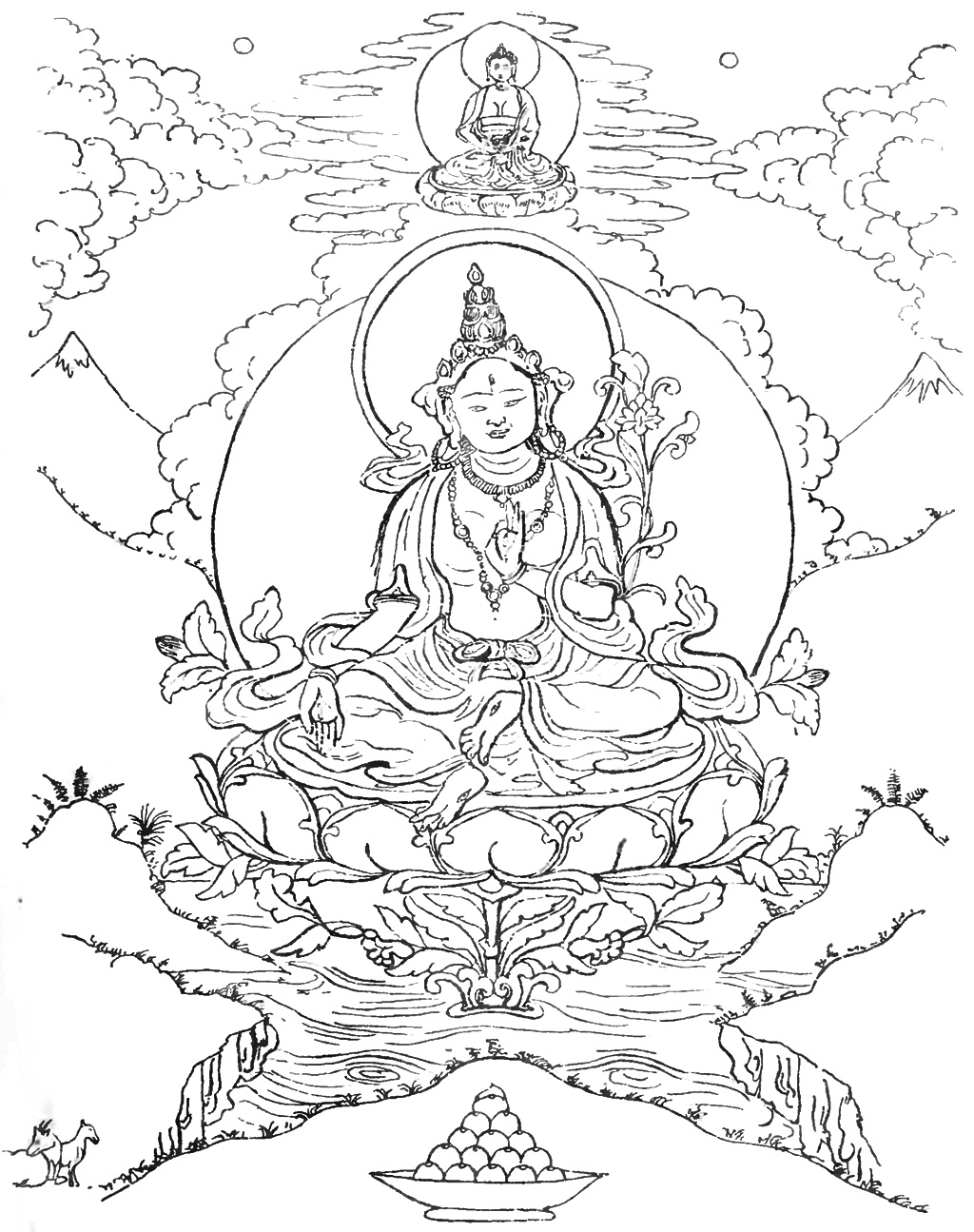 Dessin : la déesse Doljang est assise sur un coussin de lotus, en posture de la détente (les jambes repliées et non croisées), sa main gauche au niveau du cœur en mudra de la connaissance (jnana), sa main droite posée sur le genou droit, en moudra du don.